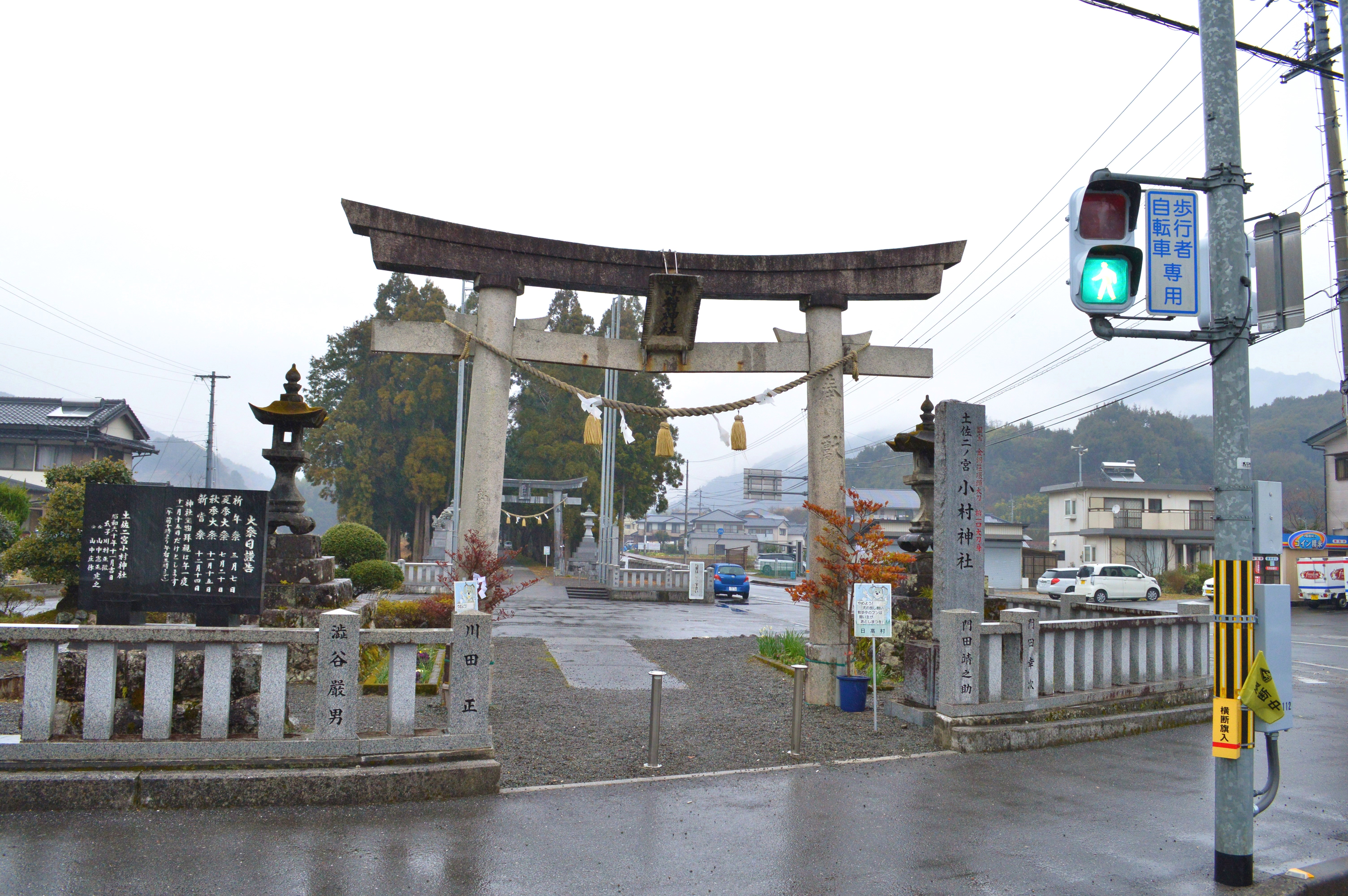 小村神社 鳥居